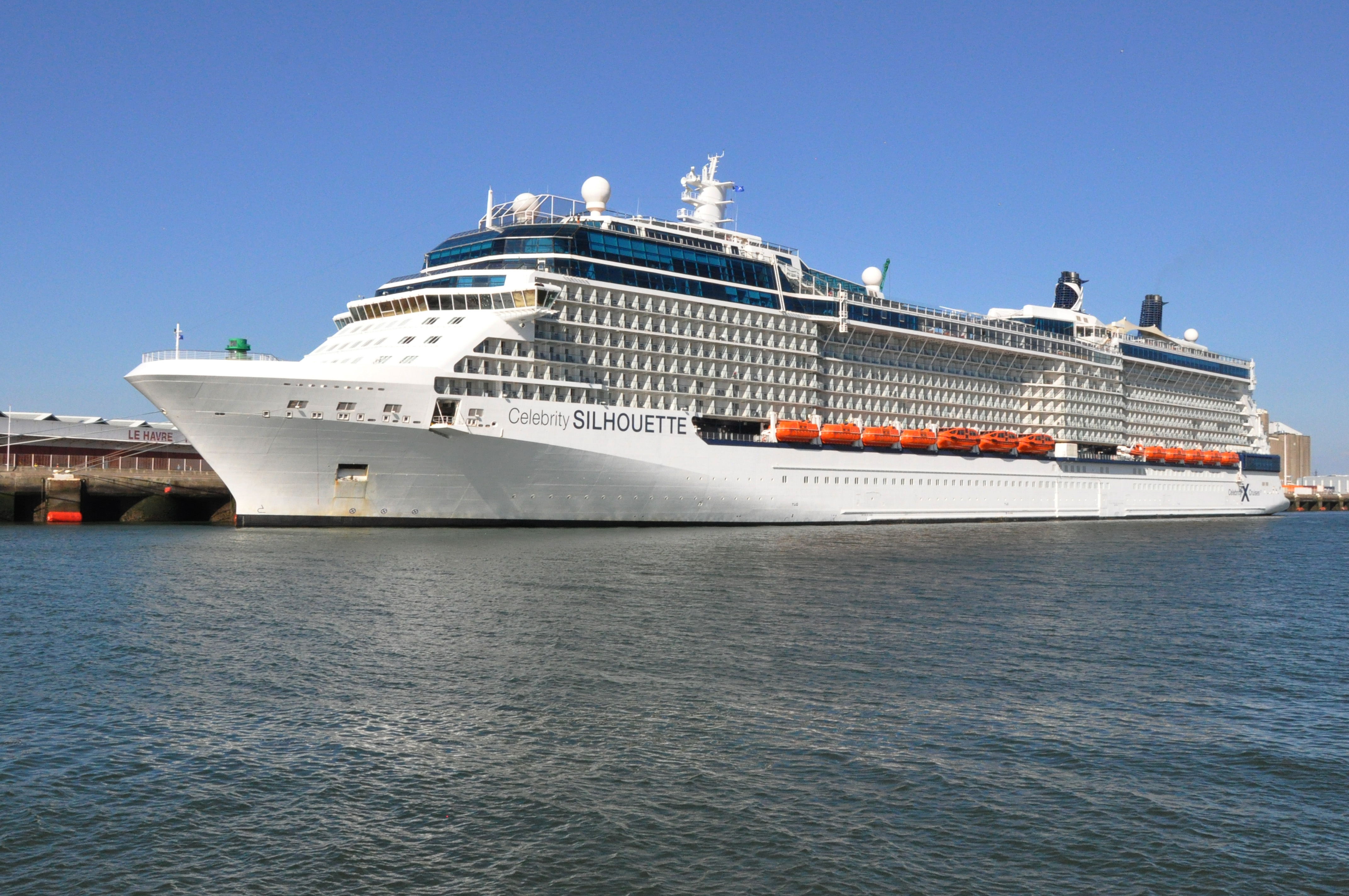 Port du Havre (Seine-Maritime, 76)